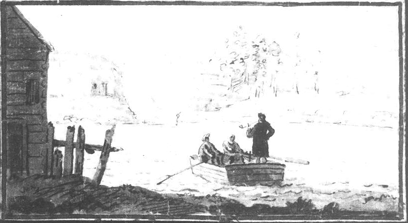 Carl Michael Bellman rökandes pipa lämnar Lidingö i en roddfärja, efter ett besök hos Peter Widman på Elfviks gård i september 1789. Till målningen hör en dikt tillägnad Peter Widman författad av Bellman som daterats till den 16 september 1789 som inleds med raderna; "Glada Elfvik, fåfängt mer, Jag din strand besöker. Misslynt jag min färja ser Och min pipa röker. Just den backen, just den där, som Elfviks grindar bär. Mig uti hjerta skär :II: Och min saknad öker. Så farväl ..." o.s.v. sketch